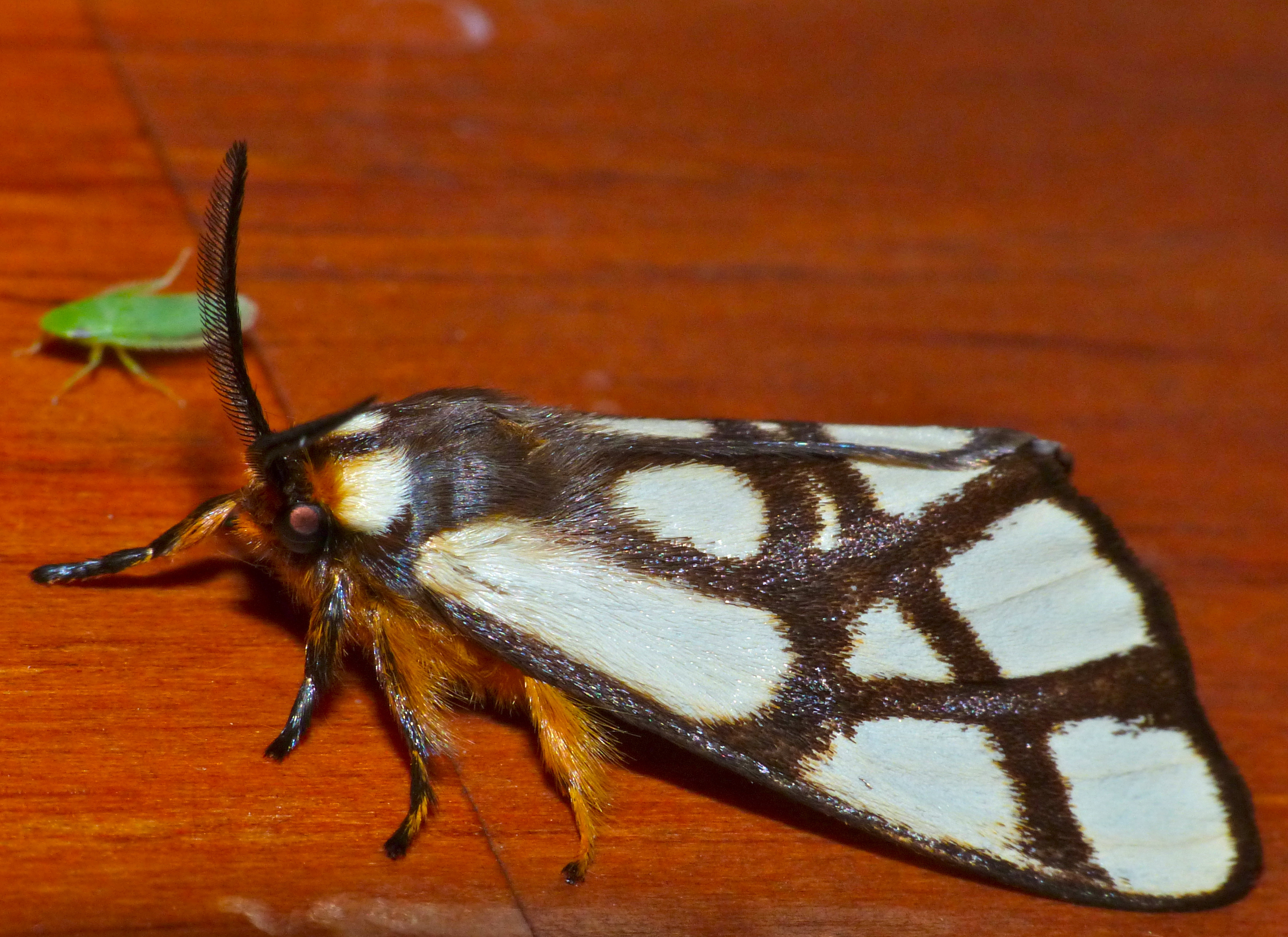 Safari Tent N°7, Lower Sabie Camp, Kruger NP, SOUTH AFRICA